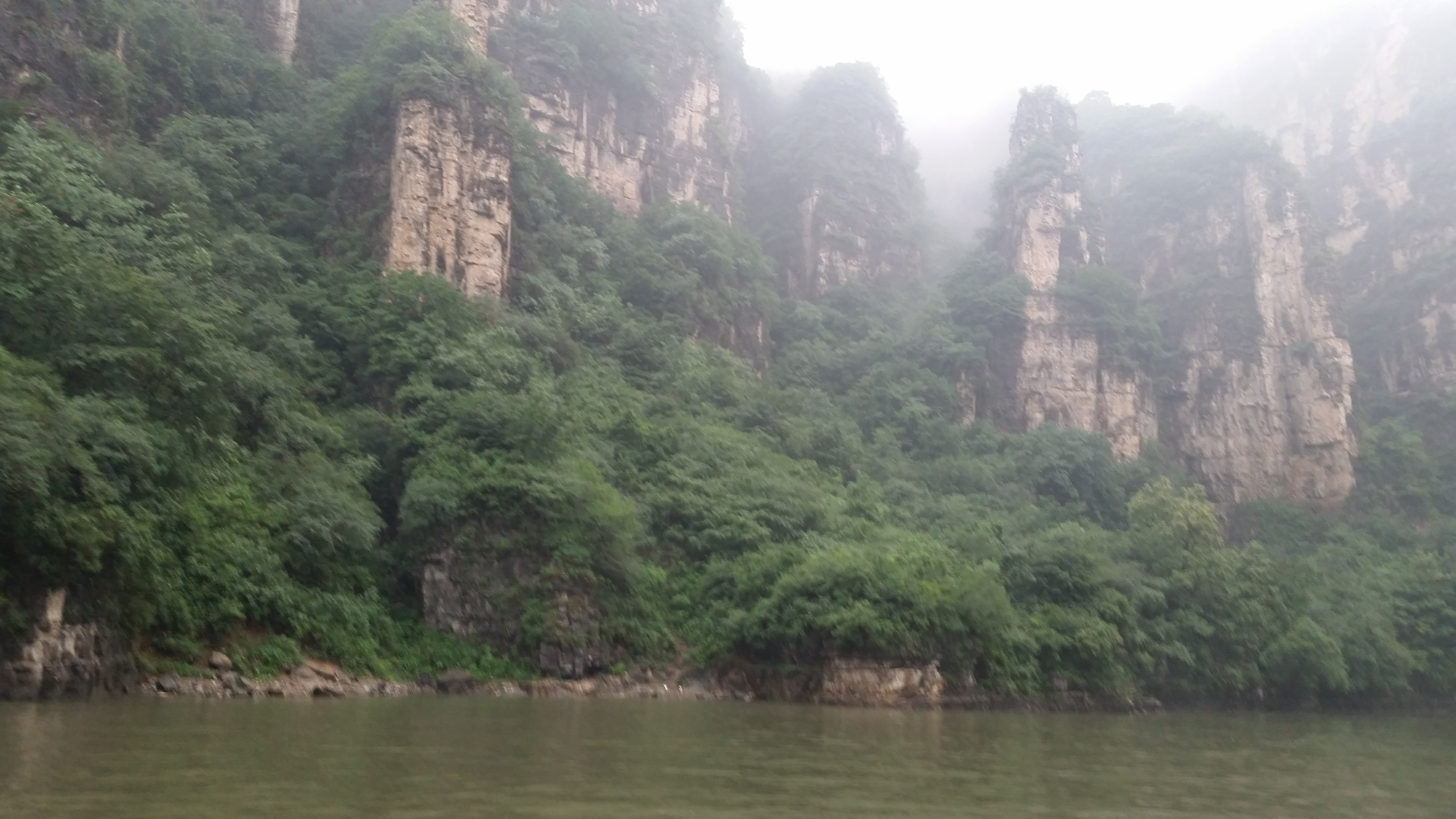 龙庆峡景区